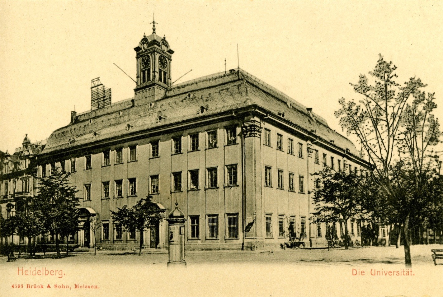 Heidelberg; Universität This postcard is from publisher Brück & Sohn in Meißen ( postcard has a unique number 04398 and is available in a higher resolution at the publisher. This images was uploaded in a cooperation project between Wikipedians and the publisher.